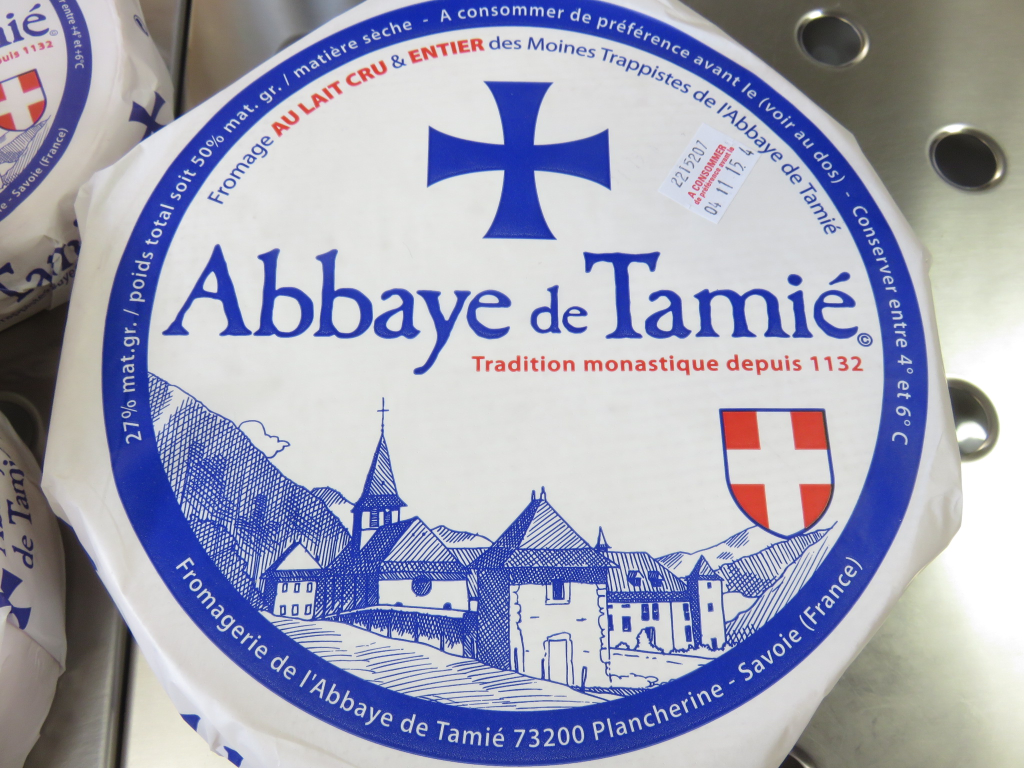 Abbaye de Tamié (cheese)